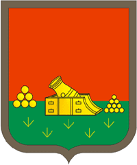 Герб города Брянск